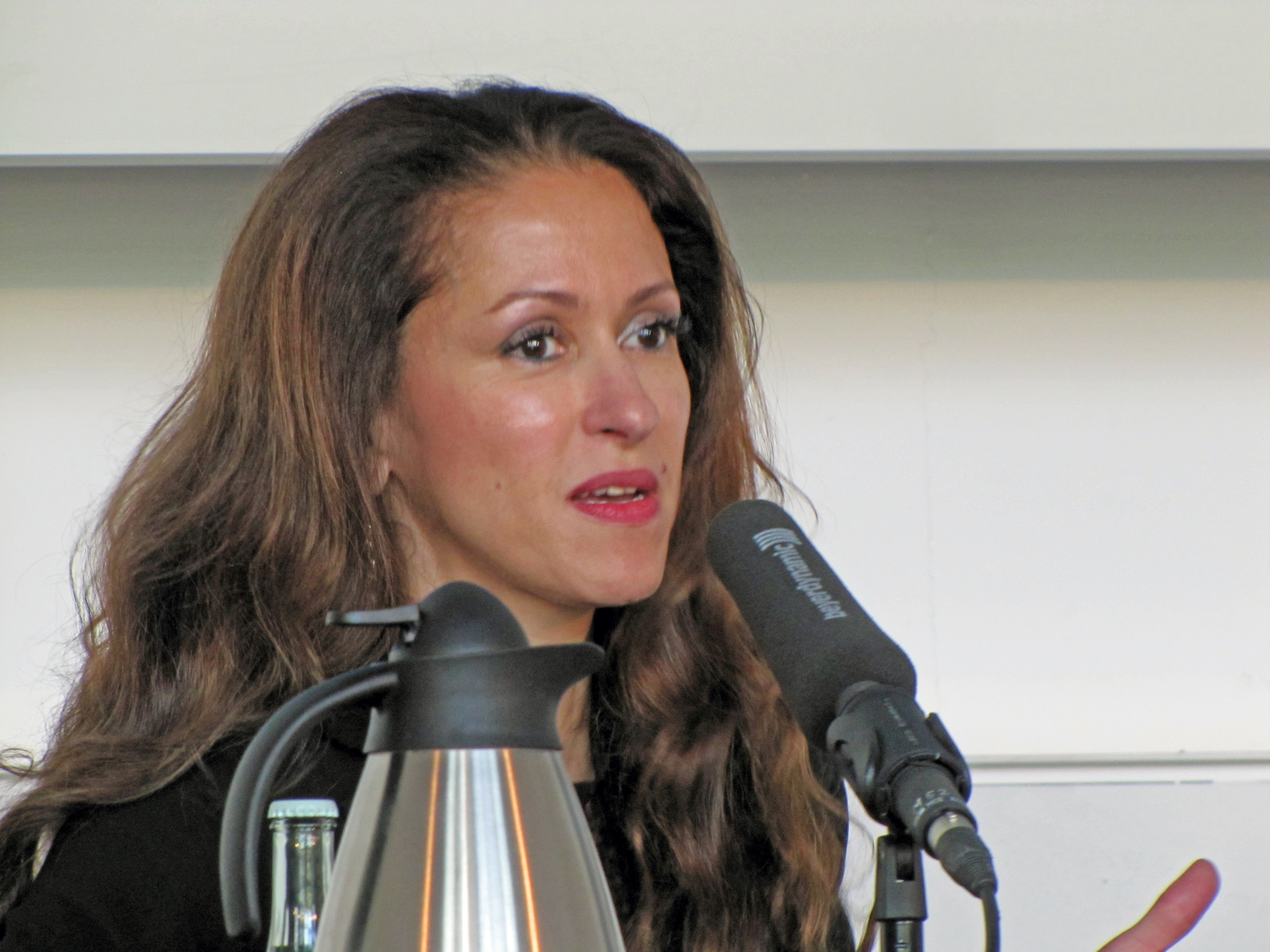 Tina Soliman, am 26. September 2015, bei den Römerberggesprächen in Frankfurt am Main.